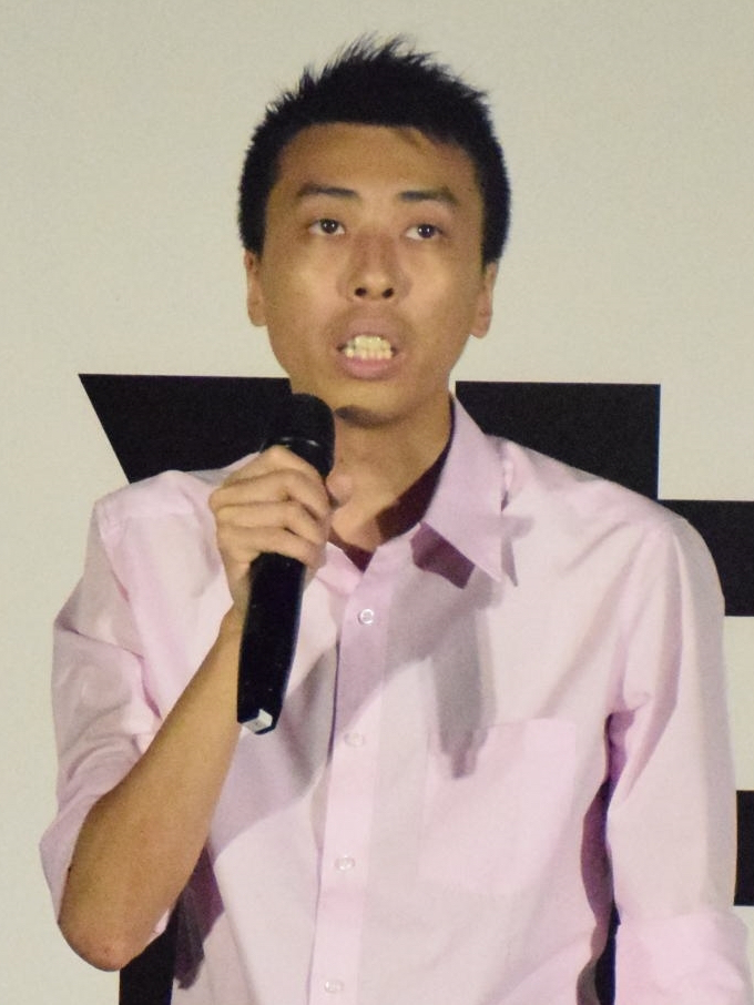 陳澤滔